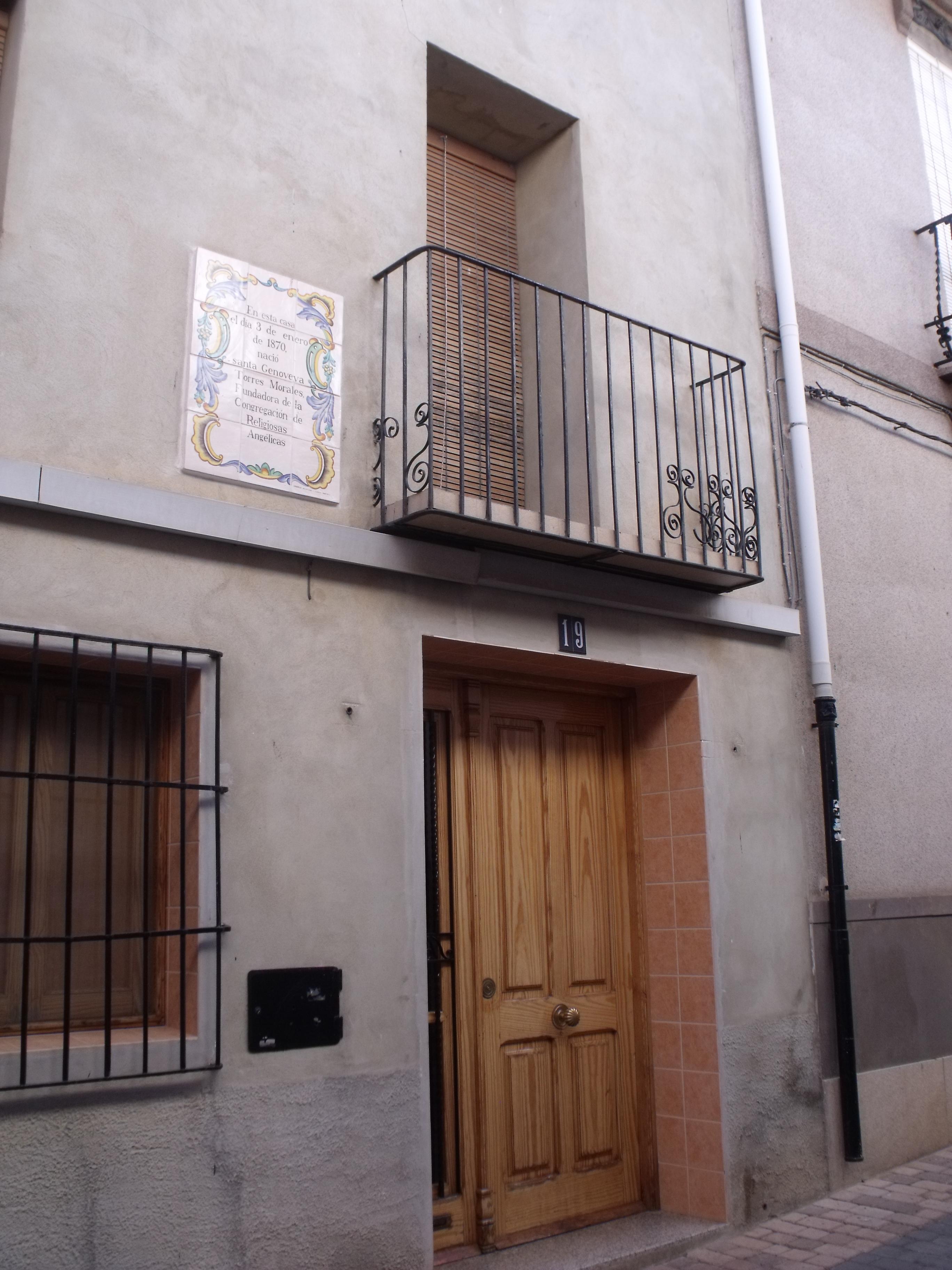 Casa Natal de Santa Genoveva Torres Morales